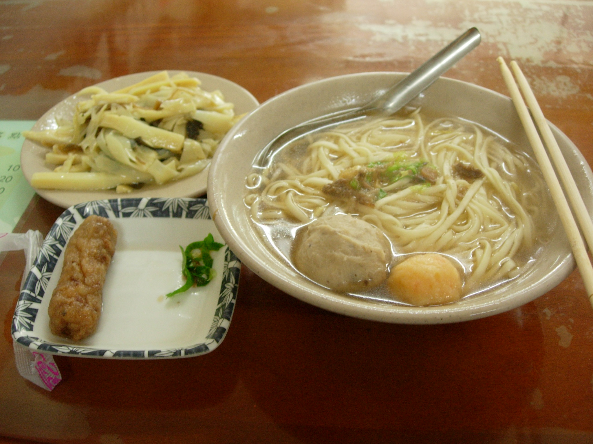 貓鼠麵以及小菜